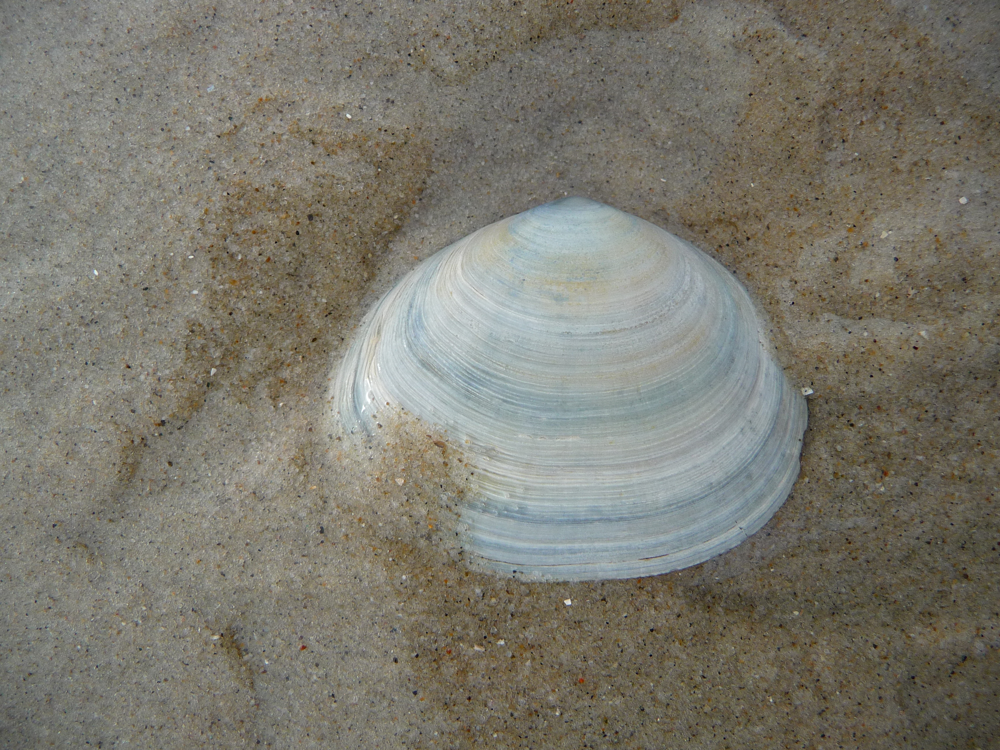 Schale der Großen Pfeffermuschel (Scrobicularia plana), fotografiert im Watt vor der ostfriesischen Nordseeinsel Juist (Niedersachsen, Deutschland)